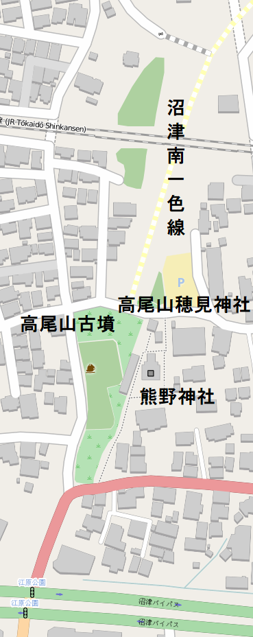 高尾山古墳の立地を示した地図。OSMをもとに作成。 This map may be incomplete, and may contain errors. Don't rely solely on it for navigation.